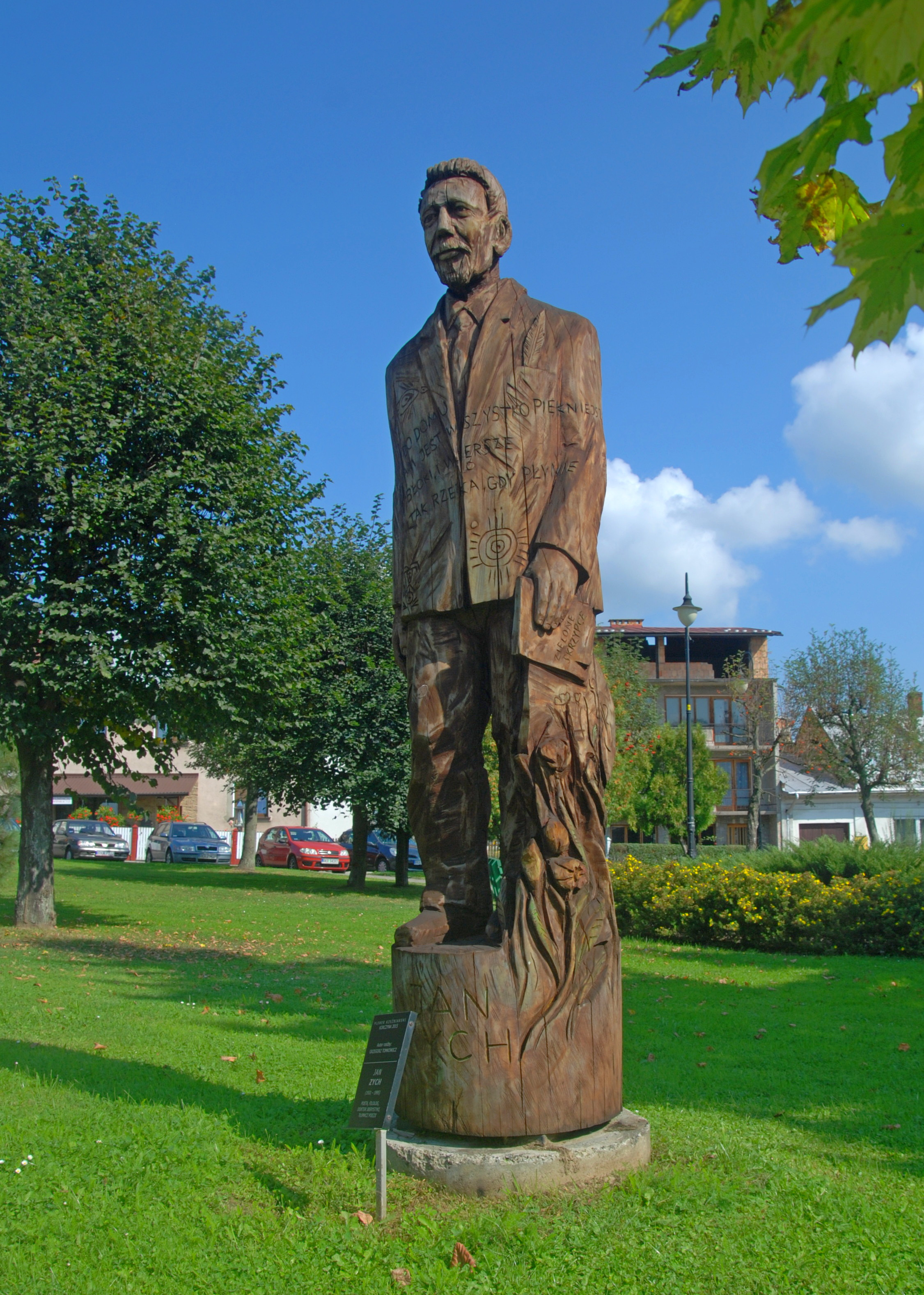 wieś Korczyna (województwo podkarpackie)